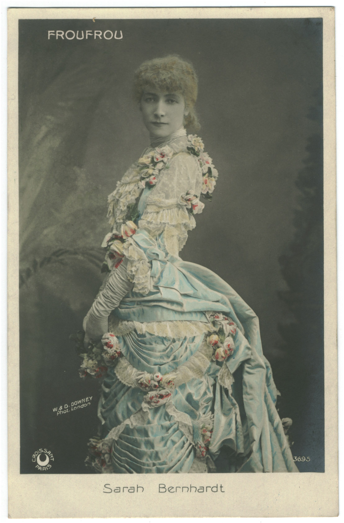 Sarah Bernhardt, Froufrou, 3695, Photo W. & D. Downey.